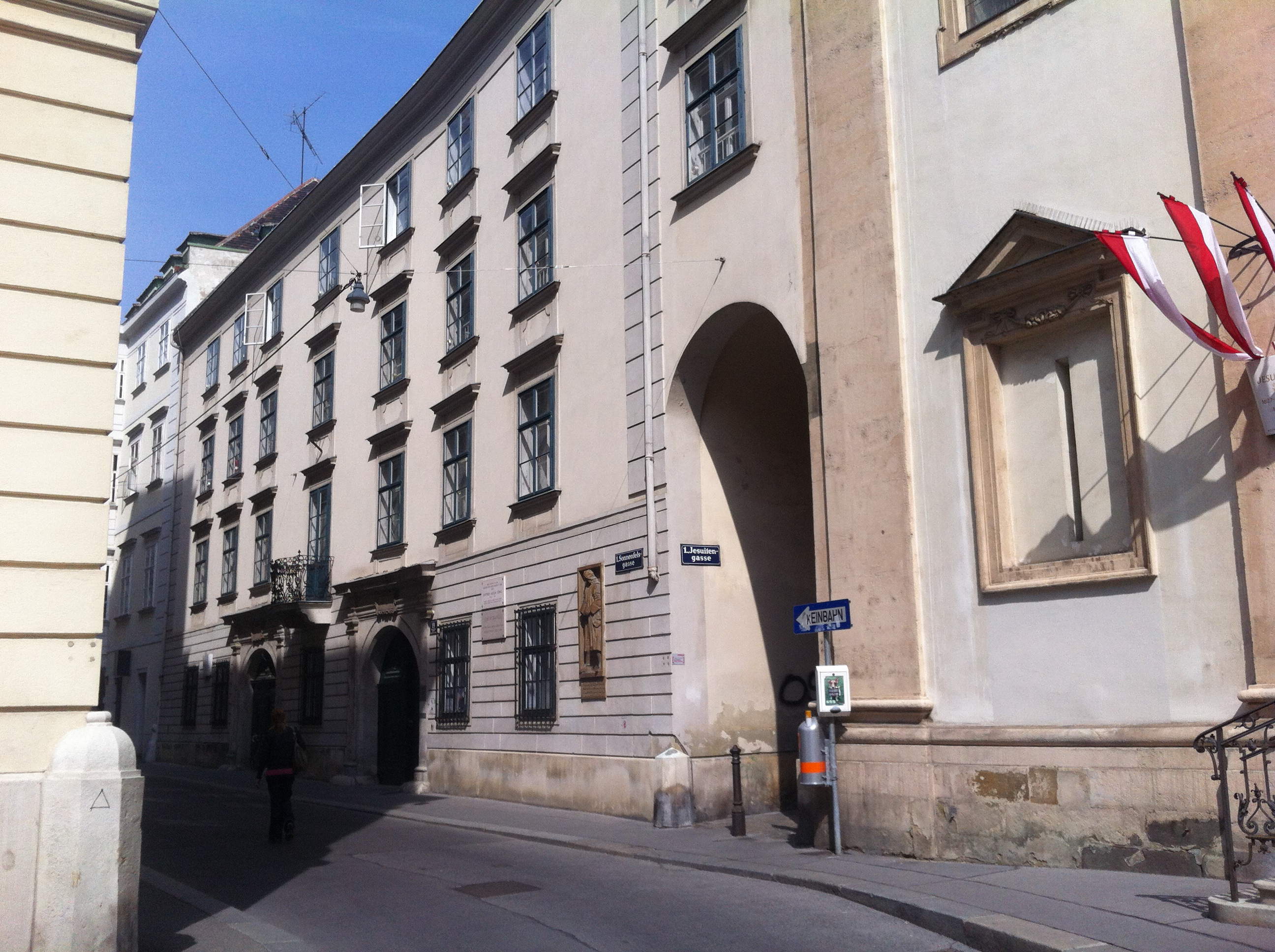 Domus Universitatis, das Pedellenhaus der Alten Universität in der Sonnenfelsgasse in Wien